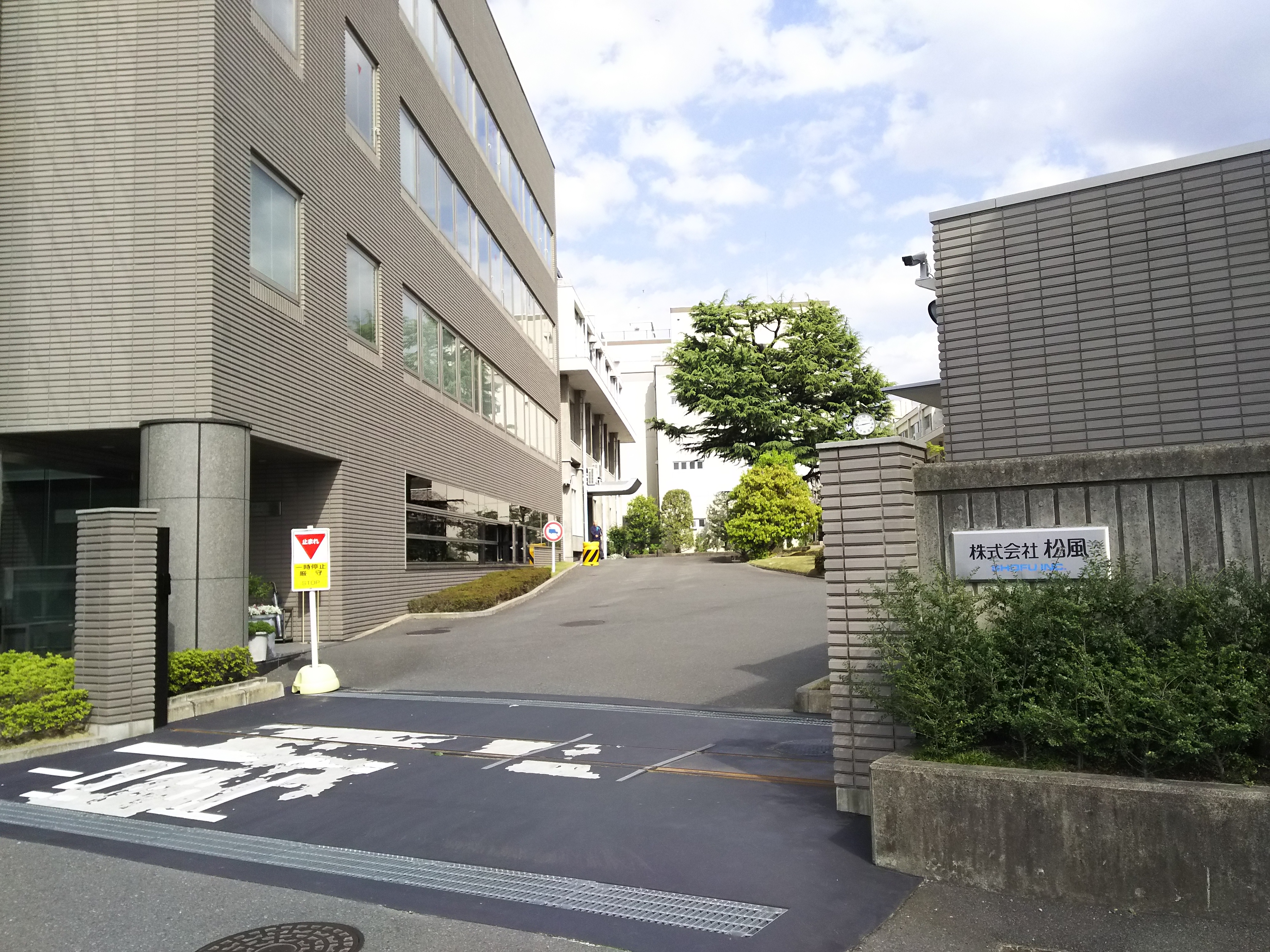 松風本社（京都市東山区）